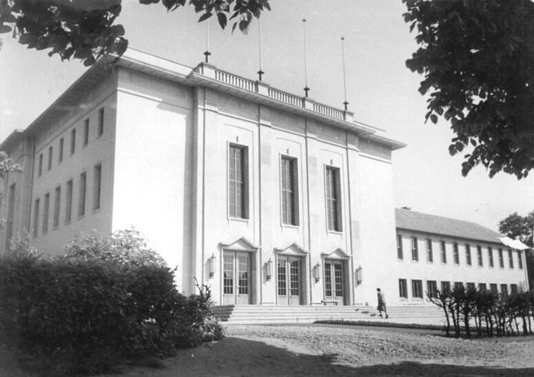 Zentralbild-Biscan Str-Ho. 8.12.1953 Im Magdeburger Kulturpalast "Ernst Thälmann" Das Kulturhaus "Ernst Thälmann" ist zum kulturellen Zentrum von Magdeburg geworden. Hier können sich die Werktätigen der fünf grossen Schwermaschinenbau-Betriebe der Stadt erholen und entspannen und haben gleichzeitig die Möglichkeit, sich in ihrem Beruf weiterzubilden. Die sowjetische Generaldirektion ließ dieses Kulturhaus mit einem Kostenaufwand von 2,5 Millionen DM aus sowjetischen Investmitteln erbauen. Auch dieses Gebäude mit seiner prachtvollen Einrichtung wird am 1. Januar 1954 durch die großzügige Freundschaftstat der Regierung der UdSSR unentgeltlich in die Hände des deutschen Volkes übergehen. UBz, Blick auf den Kulturpalast."